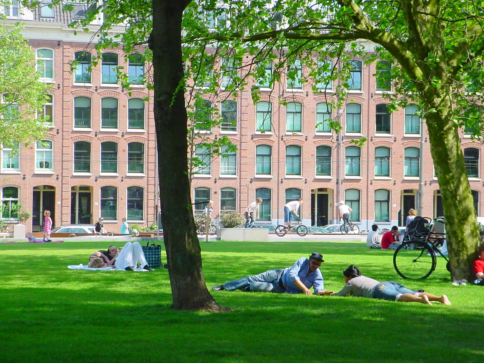 Eerste Marnixplantsoen Amsterdam luieren in het gras, achtergrond stadsvernieuwing Marnixstraat